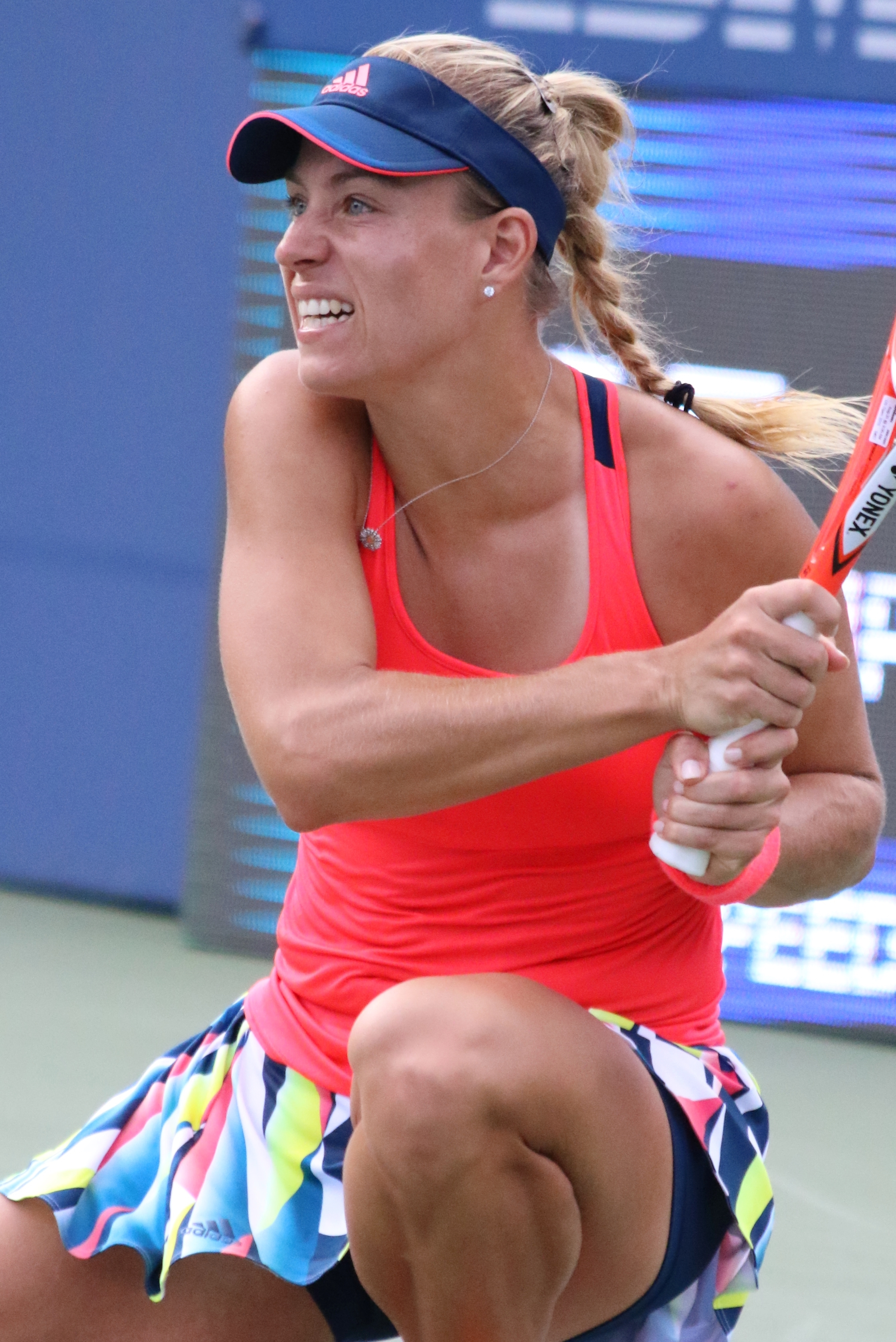 Kerber US16 (40)